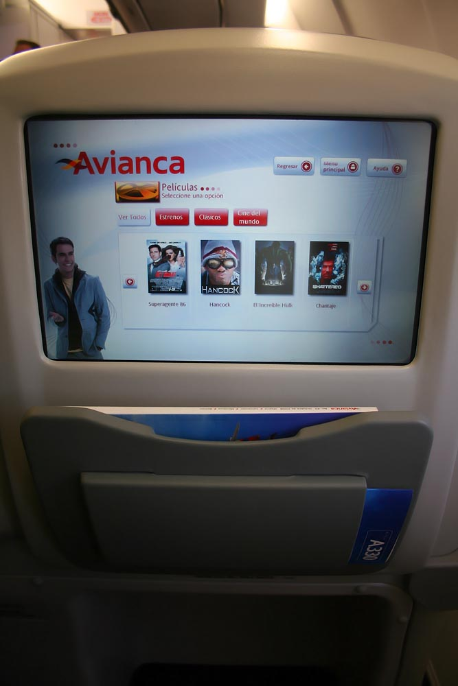 Nuevo sistema de entretenimiento en clase ejecutiva en el Airbus A330